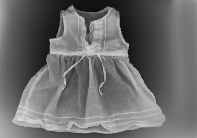 Věra Stuchelová´s photographs